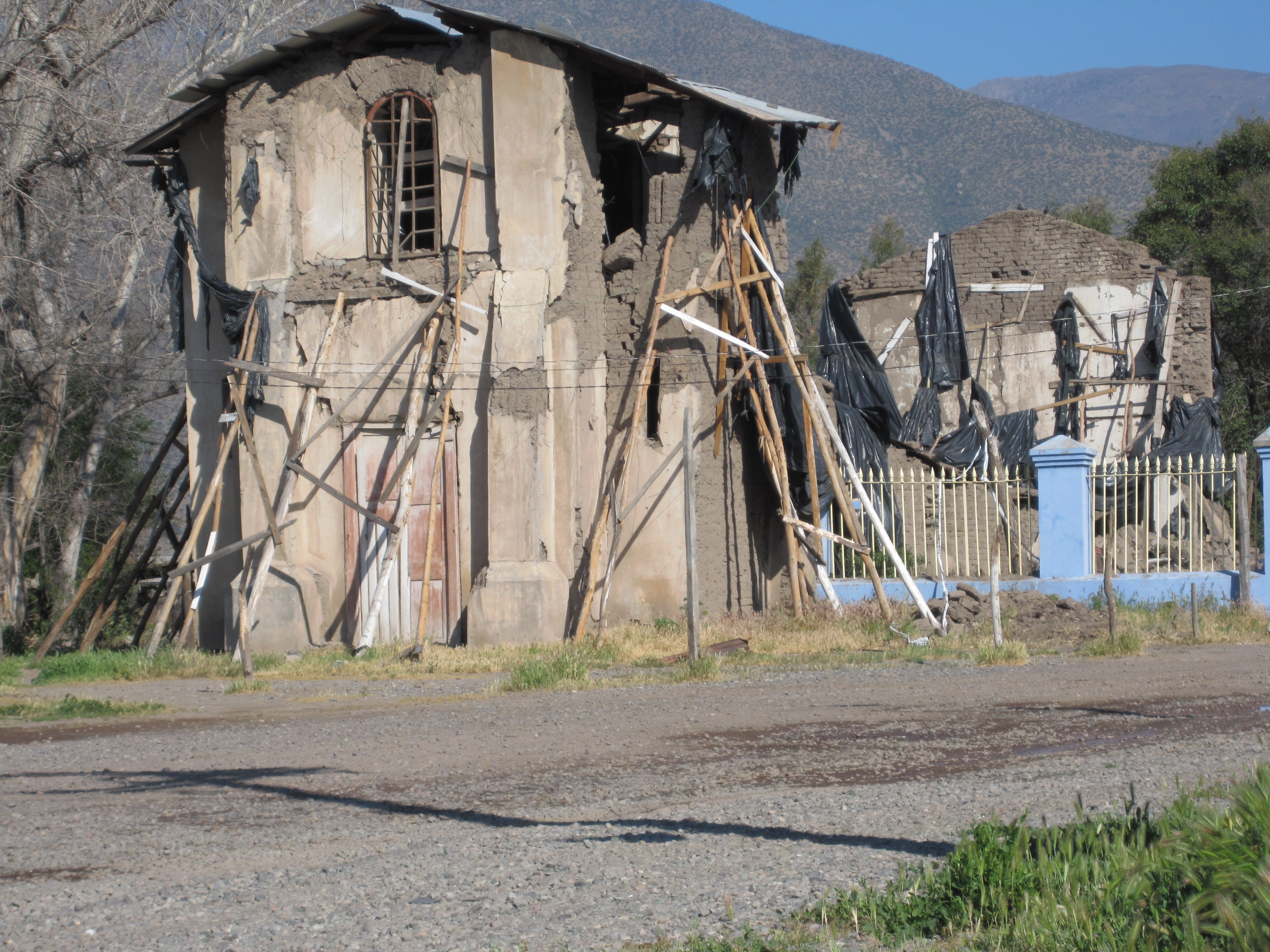 Capilla de Lo Vicuña This is a photo of a national monument in Chile: 2019